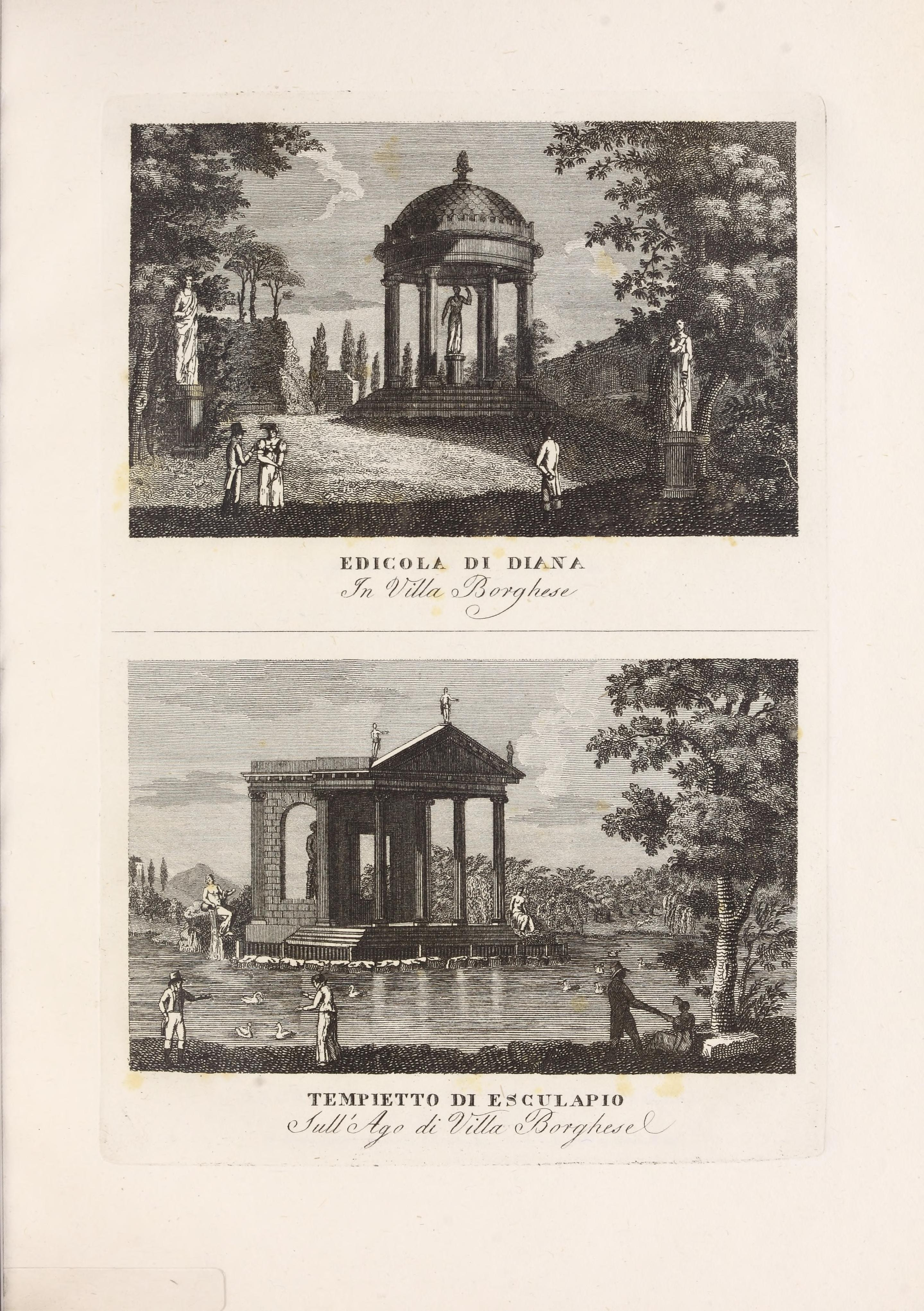 Illustrasjon hentet fra boken "Raccolta di vedute antiche e moderne della città di Roma e sue vicinanze" av ukjent forfatter og utgitt av Presso Piale neg.e di stampe a S. Carlo al Corso (it, 1816)